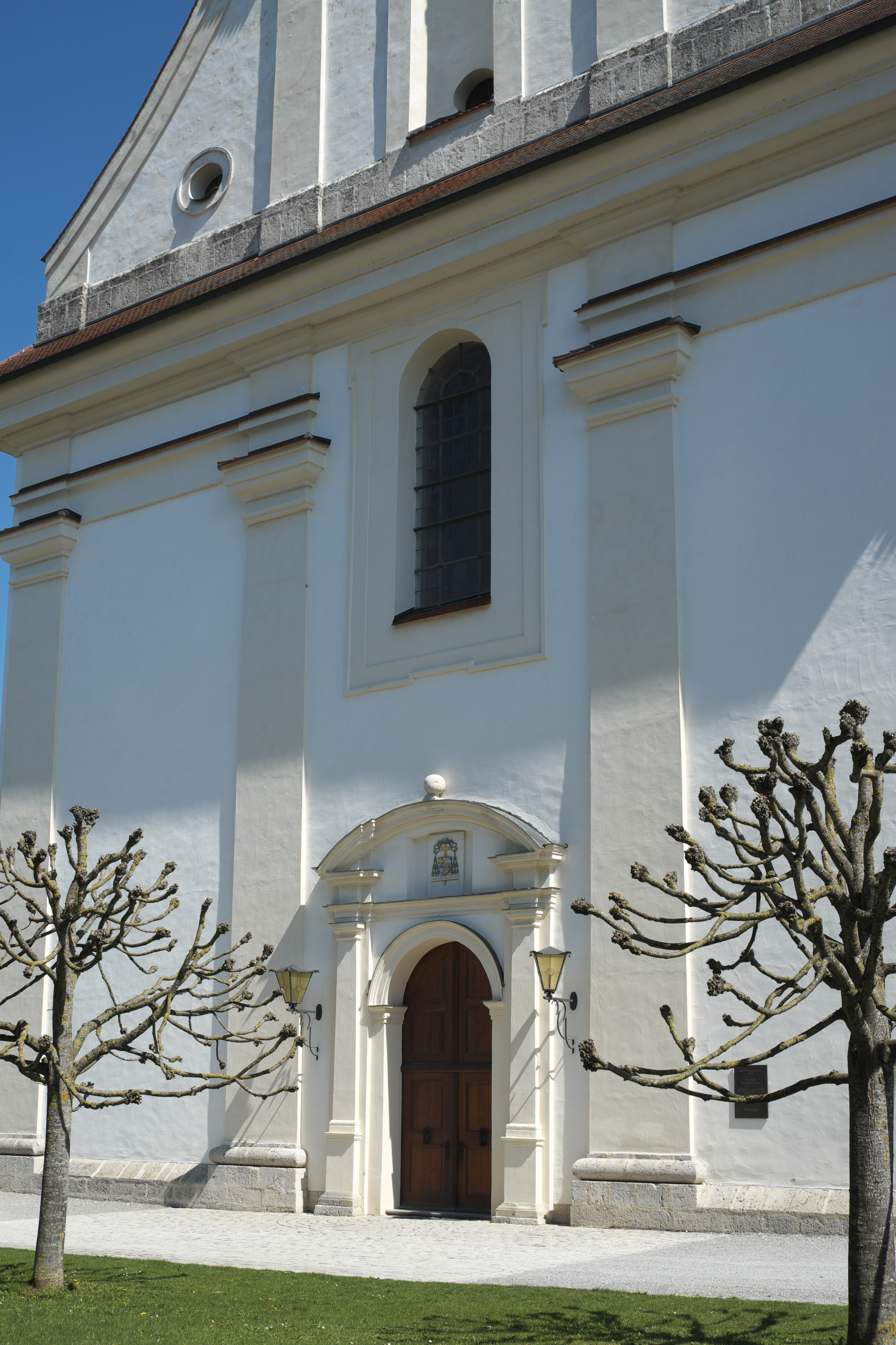 Ehemalige Prämonstratenserstiftskirche, Münster St. Peter und Paul, in Obermarchtal im Alb-Donau-Kreis (Baden-Württemberg/Deutschland)